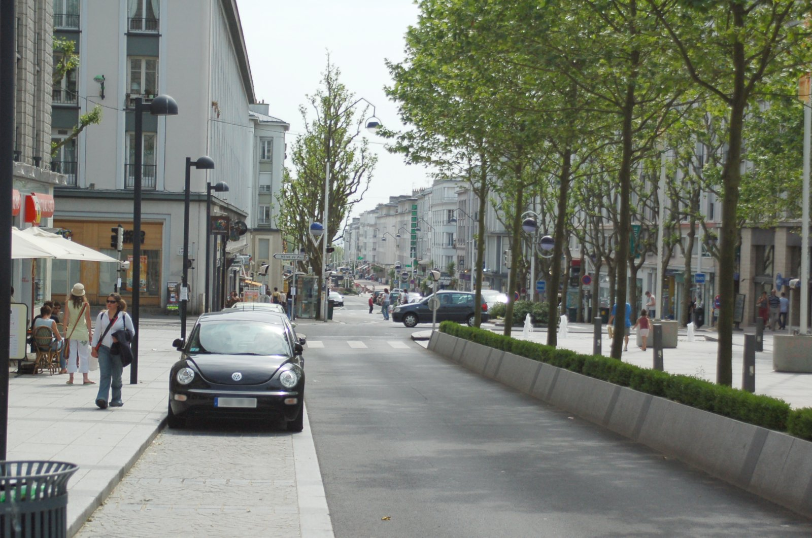 Rue de Siam, Brest, France